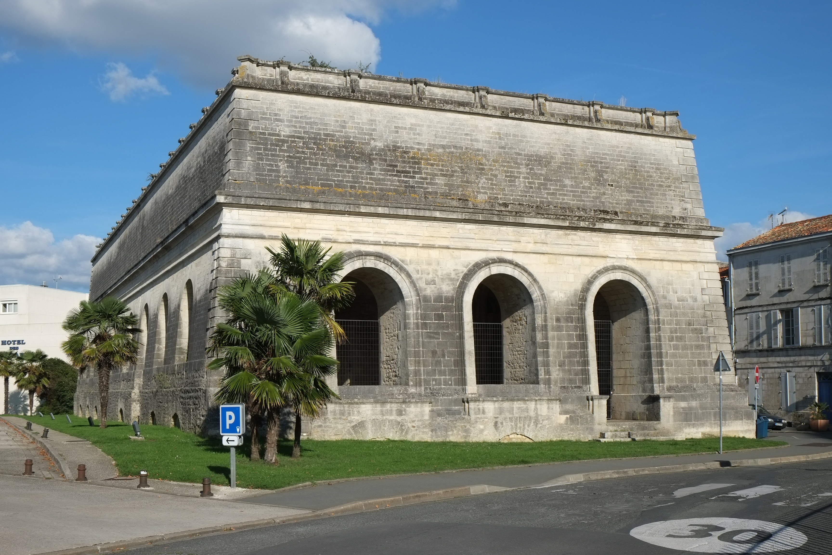 Ancien château d'eau Rochefort Charente-Maritime France